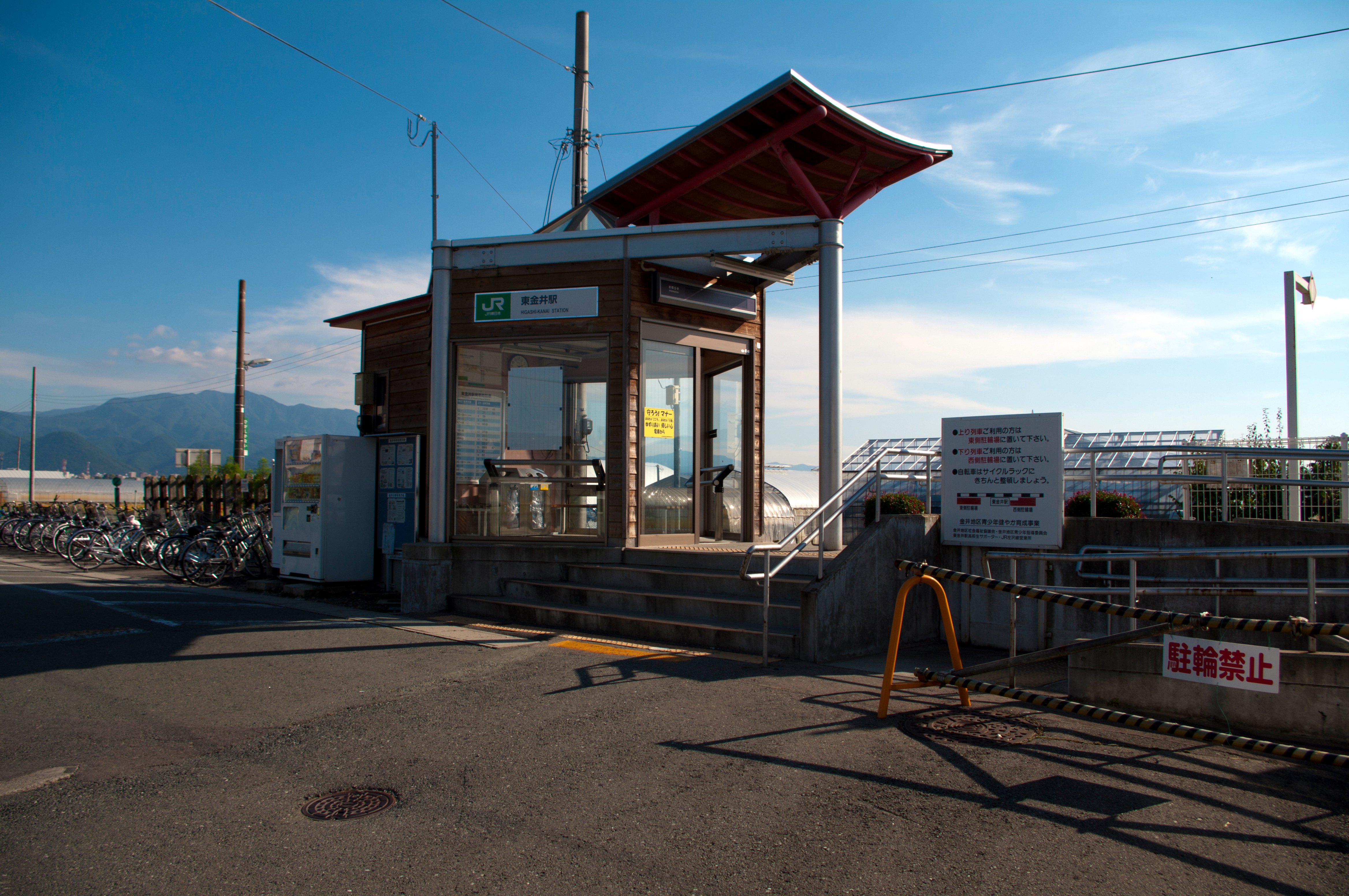 東日本旅客鉄道左沢線東金井駅